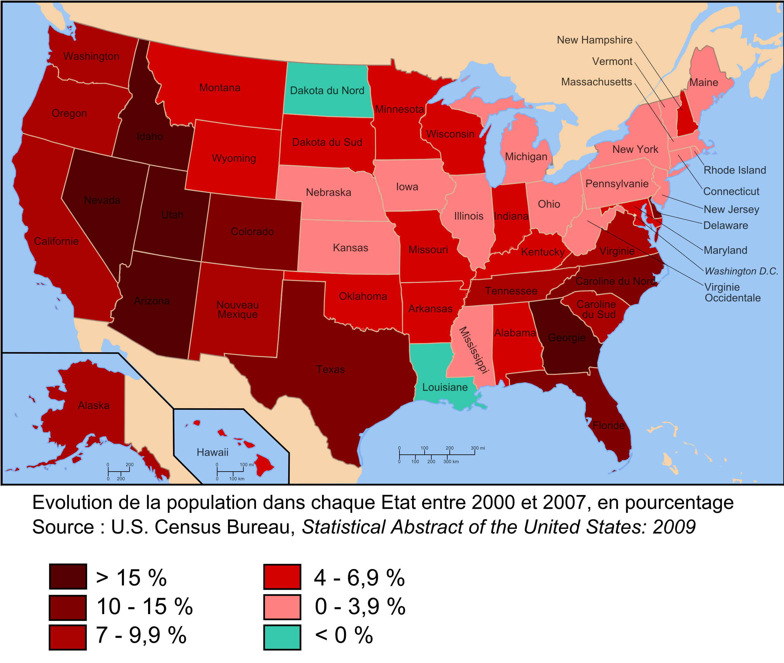 Carte de l'évolution de la population de chaque état des USA, en % entre 2000 et 2007. Source : U.S. Census Bureau